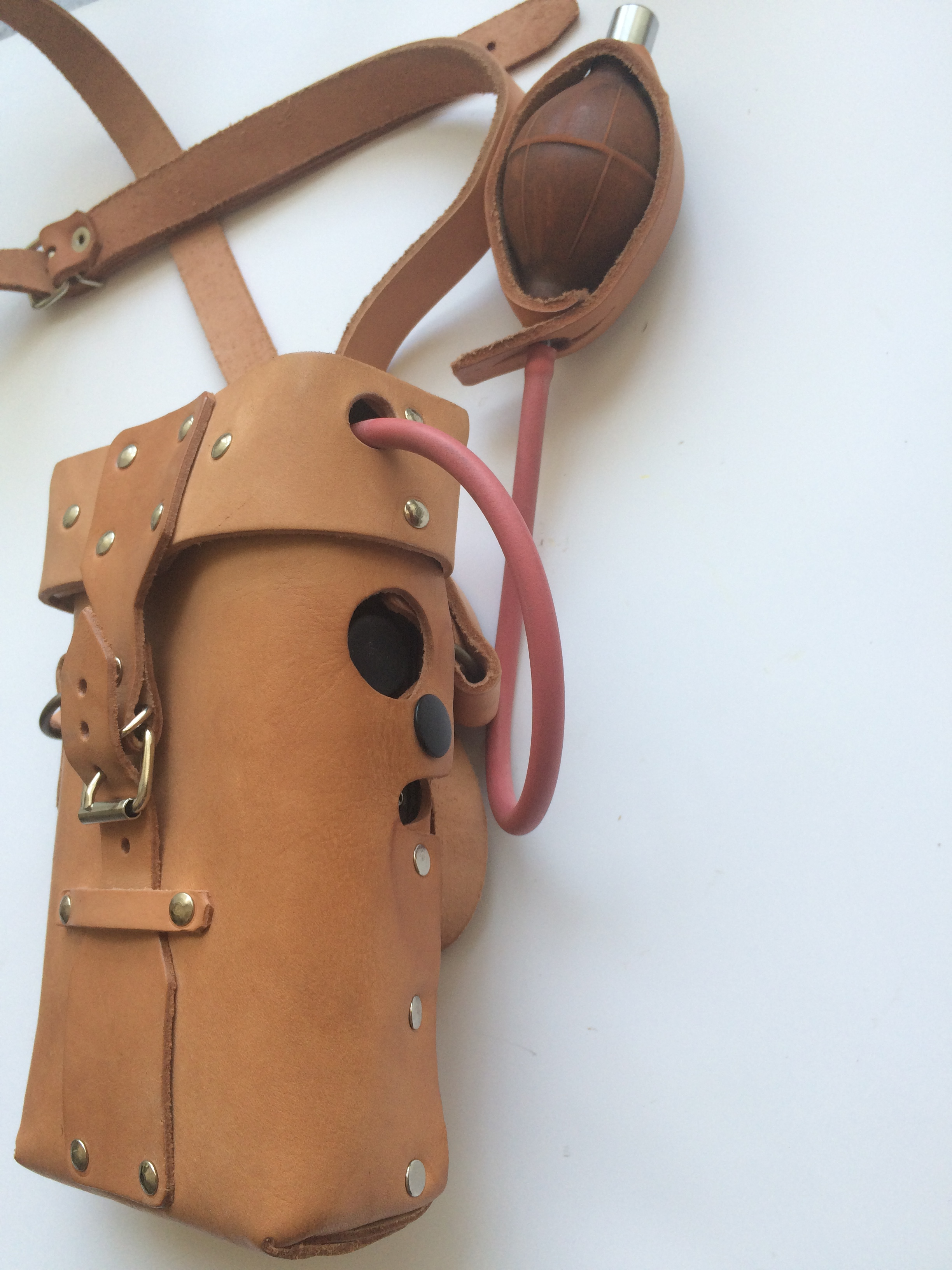 Interferometr OKD